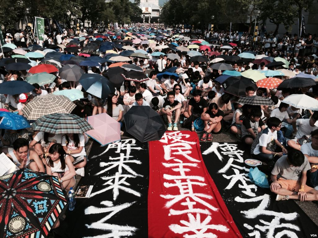 香港學聯表示，25間大專院校約13,000名大專學生參與星期一中大舉行的罷課集會。